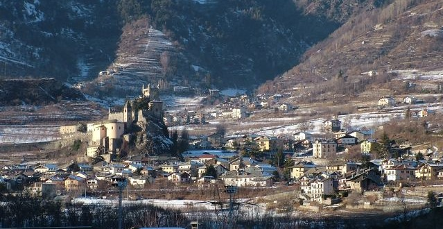 Saint-Pierre, Valle d'Aosta, Italia.